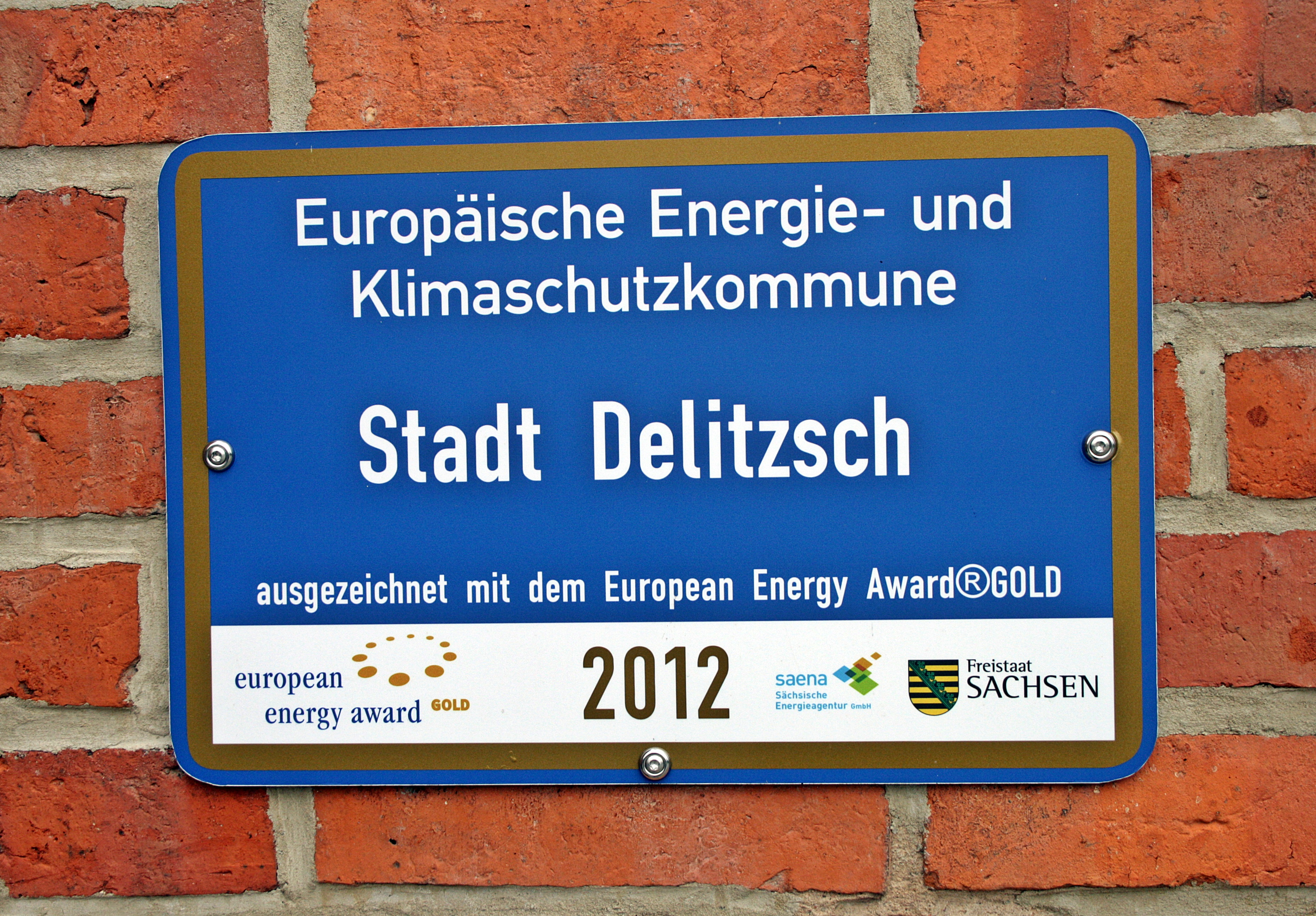 Europäische Energie- und Klimaschutzkommune Delitzsch, ausgezeichnet mit dem European Energy Award in Gold